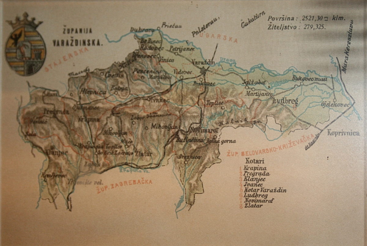 Zemljovidi županija na razglednicama oko 1900. godine , snimljeno tijekom Noći muzeja